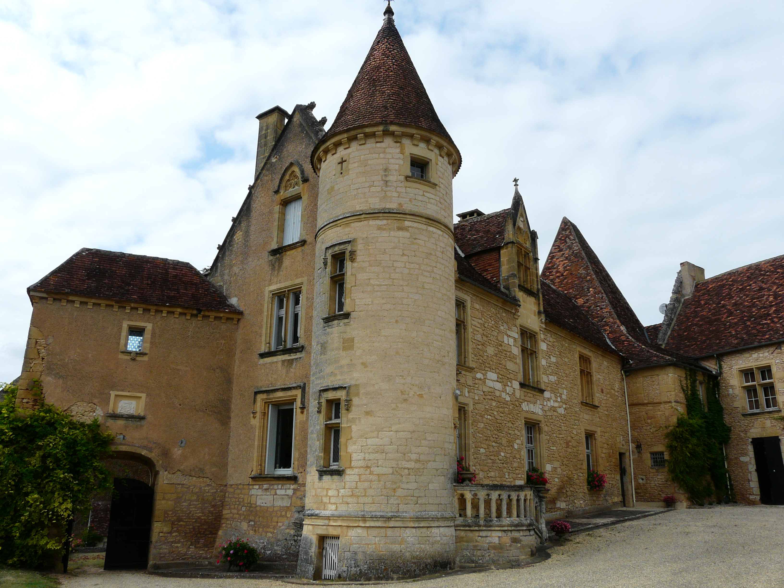 Le château de Monsec vu depuis le sud-est, Mouzens, Dordogne, France. .